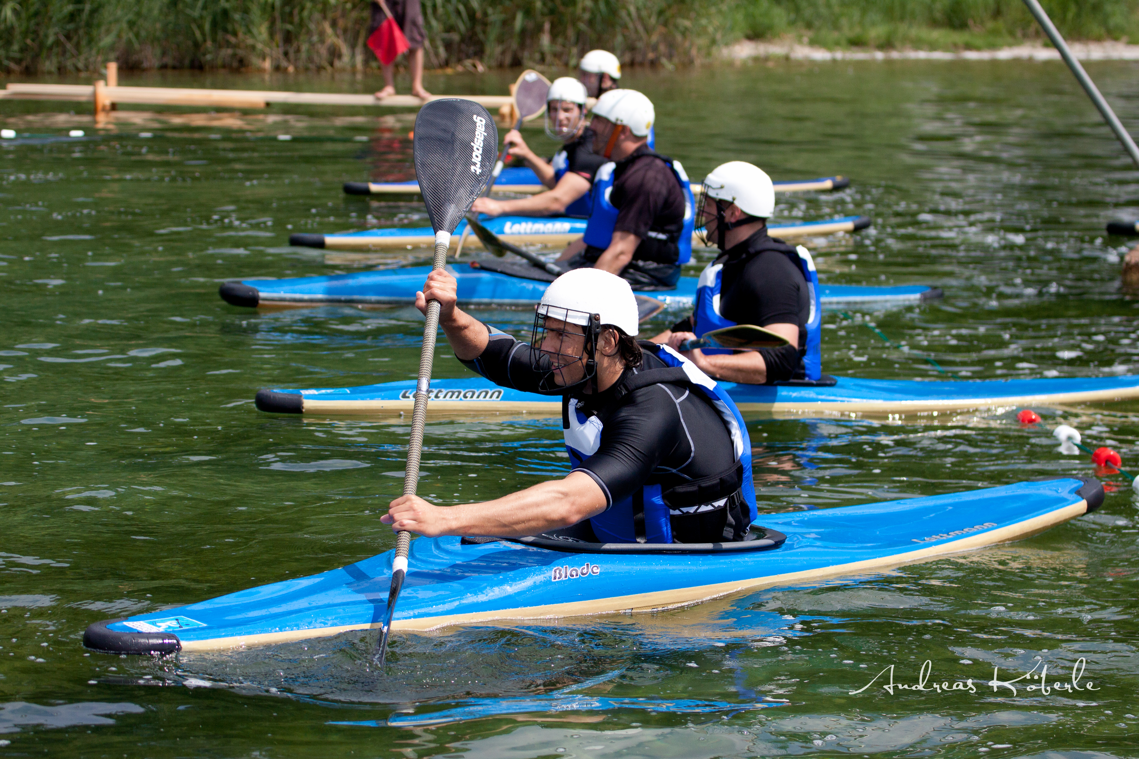 Kanupolo Bundesliga